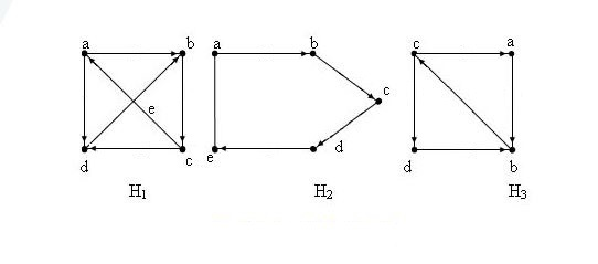 Đồ thị Euler - Đồ thị nửa Euler_1